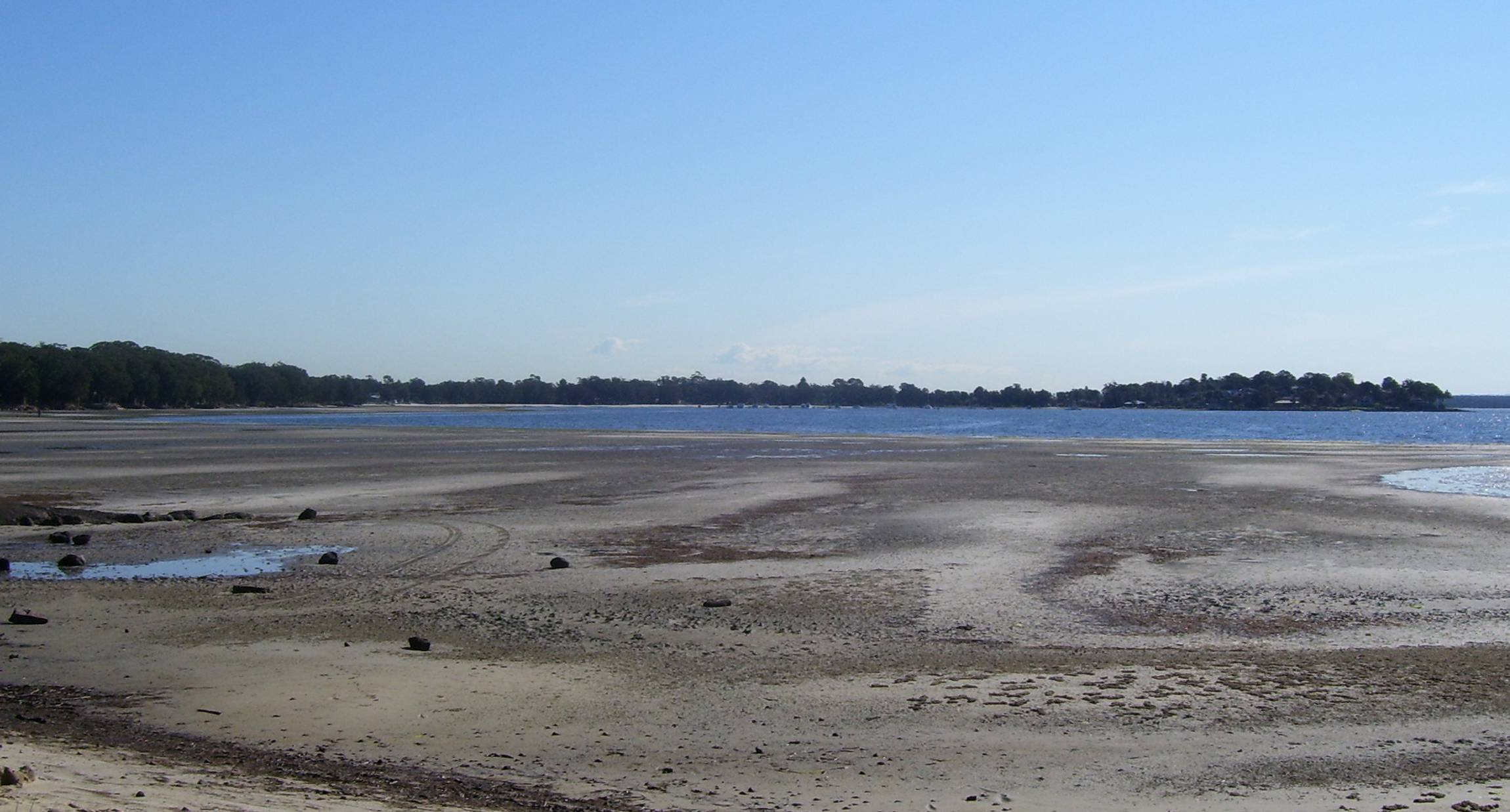 Tanilba Bay form Mallabula